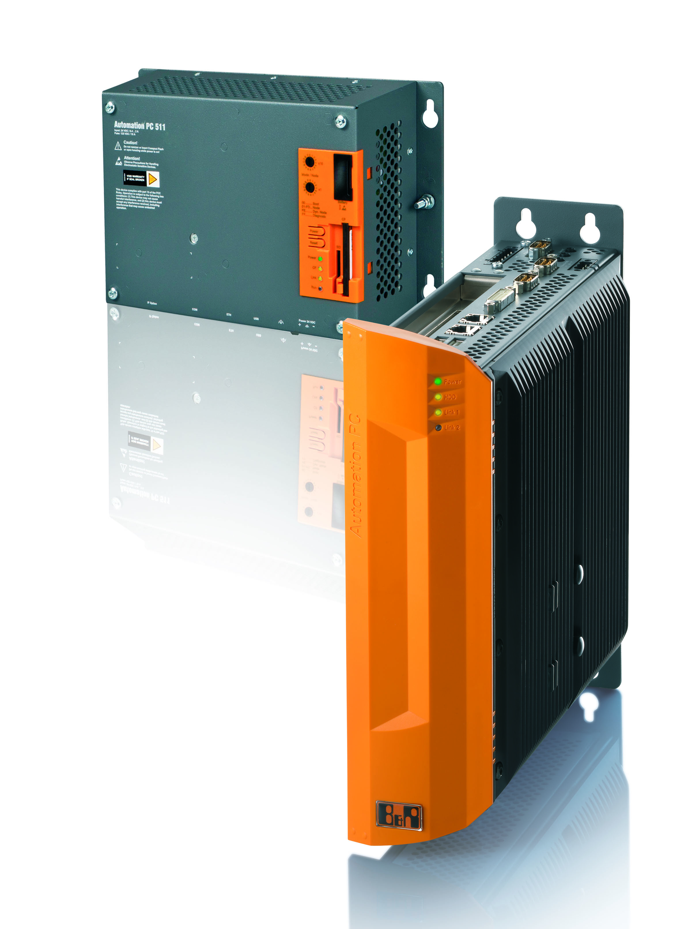 B&R Automation PC 510 / 5100